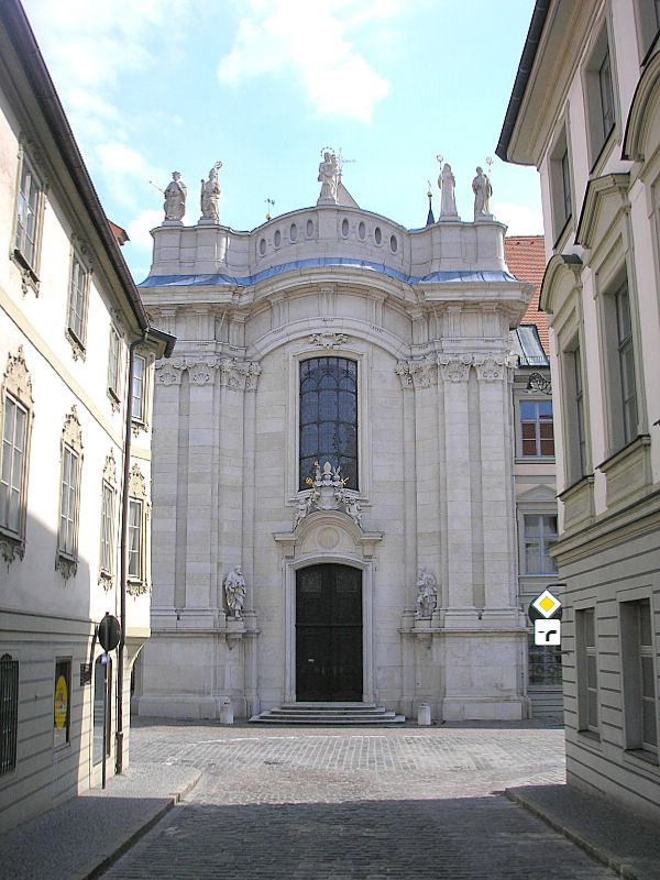 Dom zu Eichstätt (Oberbayern). Die barocke Westfassade. Eigene Aufnahme, April 2007 / Eichstaett cathedral (Upper Bavaria, Germany). The baroque western facade. Own photo, April 2007